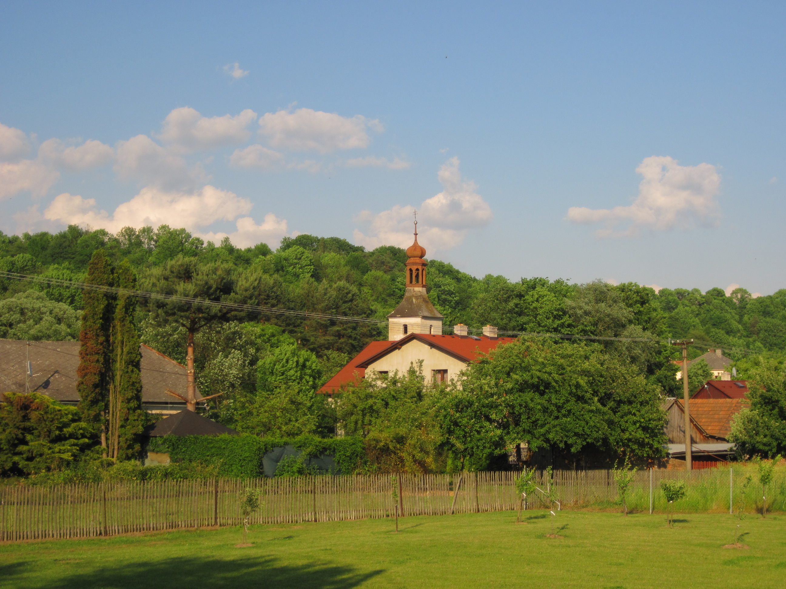 zvonice od silnice na Městečko Trnávka